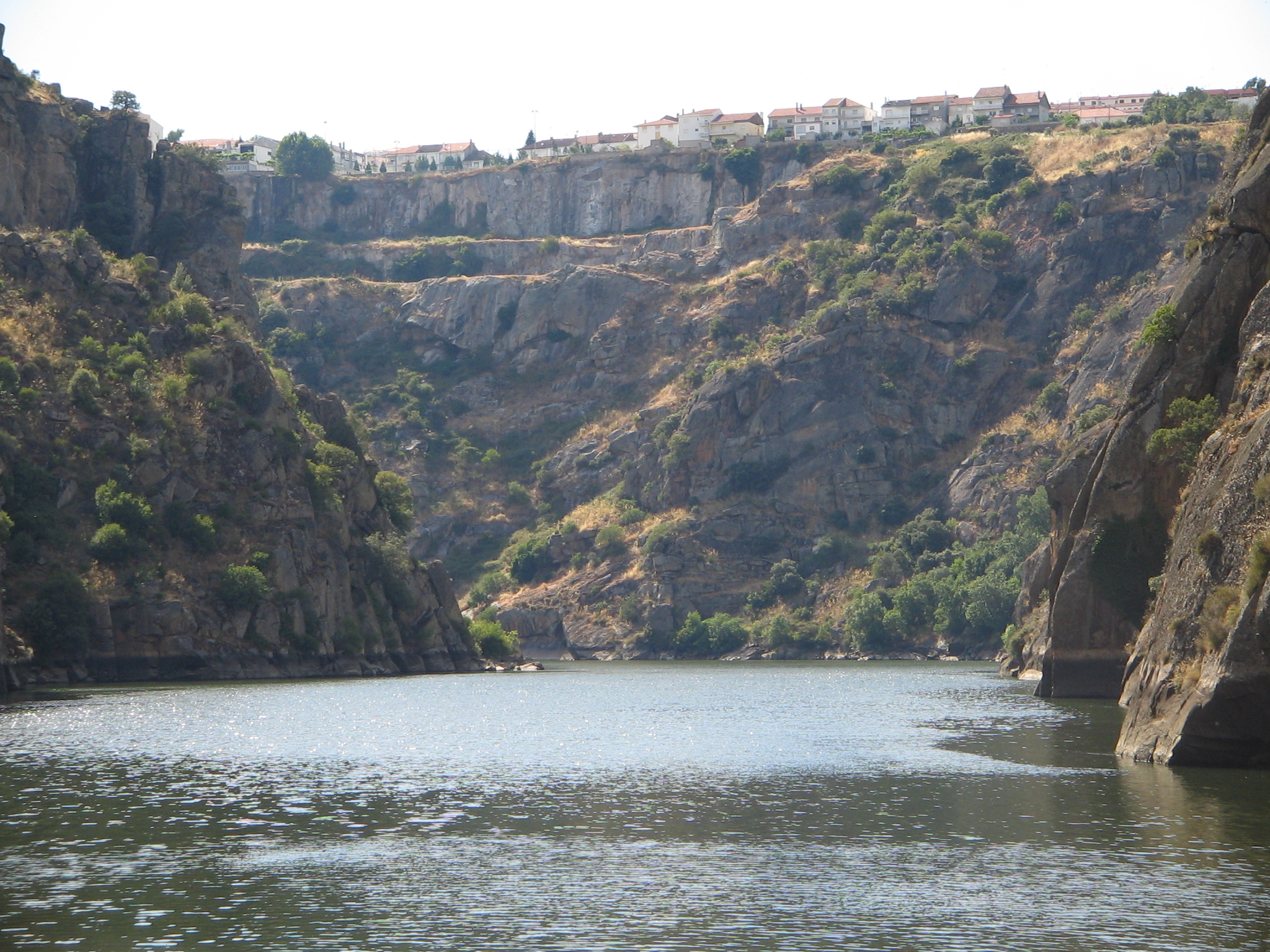 Miranda de Douro : vista general desde el rio.